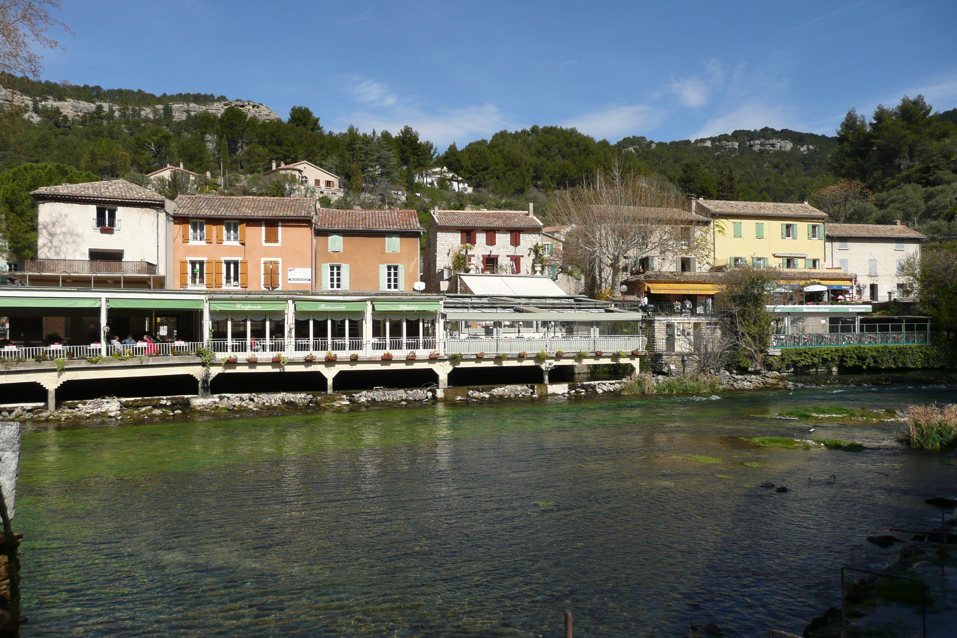 La Sorgue à Fontaine de Vaucluse.